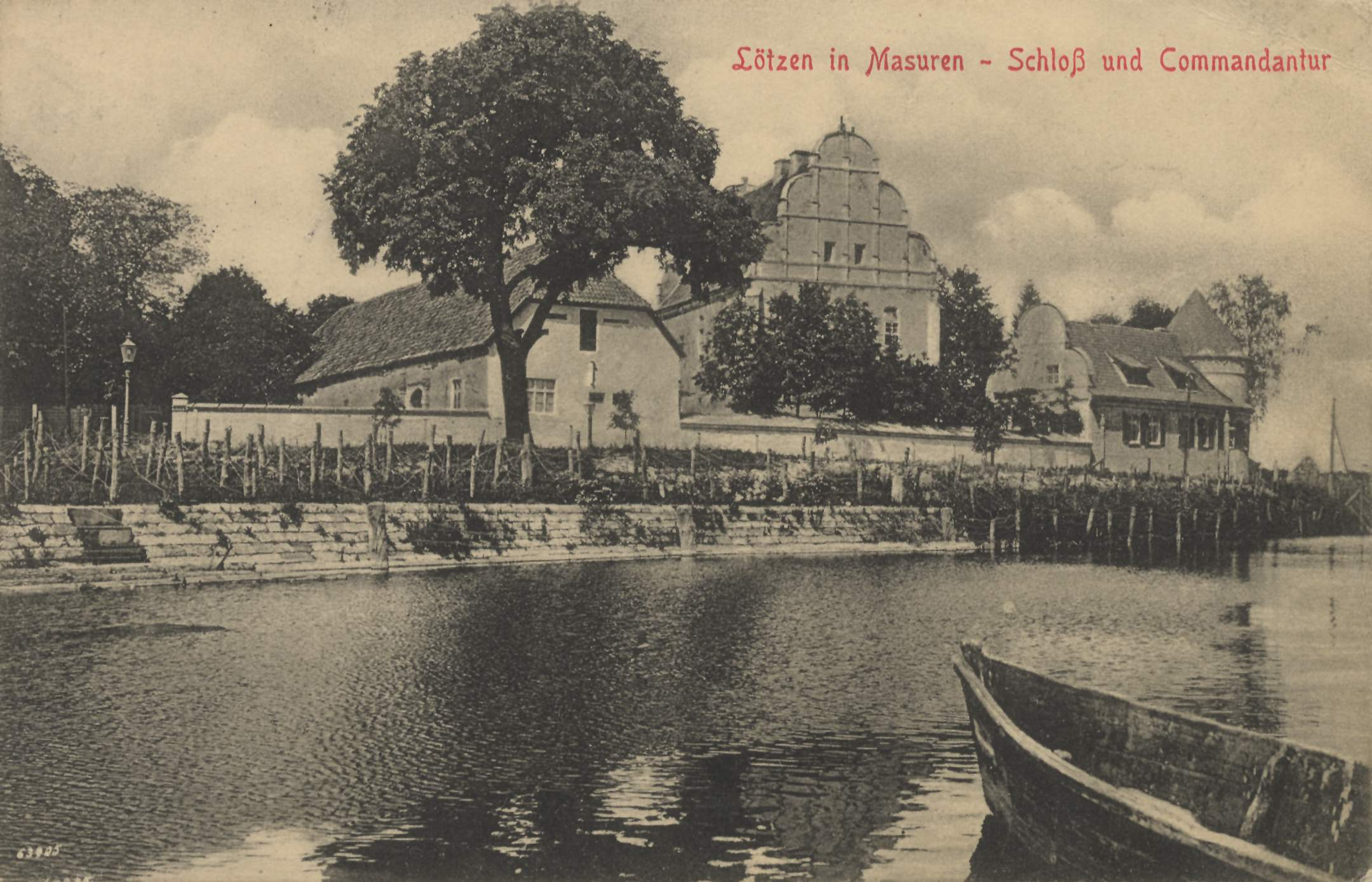 Schloss und Kommandantur